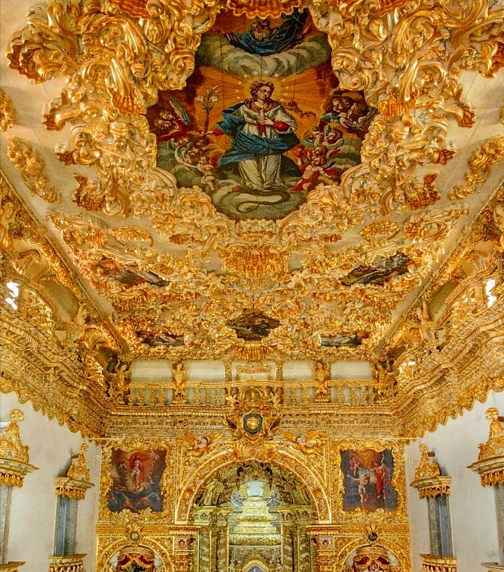 Vista da nave da Igreja de Nossa Senhora da Conceição dos Militares - Recife-PE